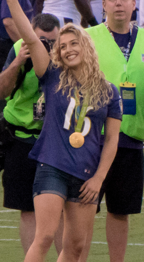 Lions at Ravens 8/27/16